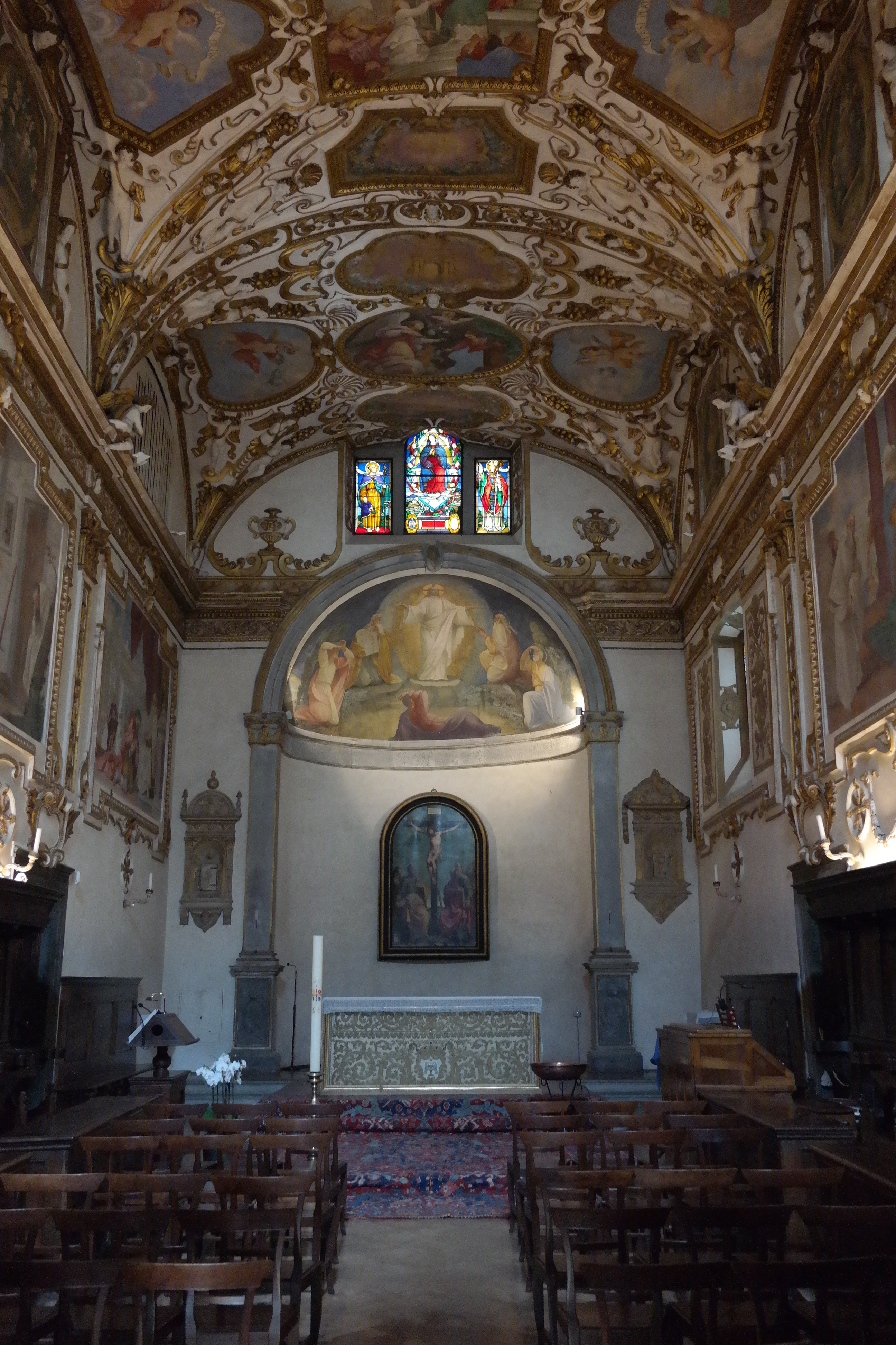 Interno della Chiesa dell'Eremo di Camaldoli